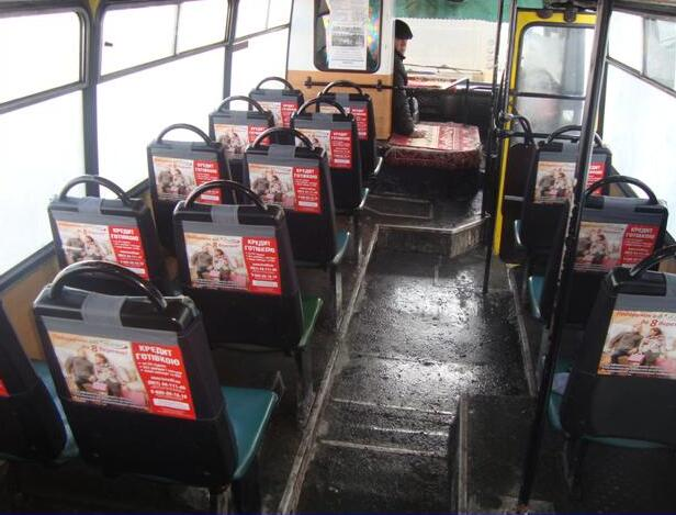 Реклама на сидіннях маршруток, проект РА "Trans City"